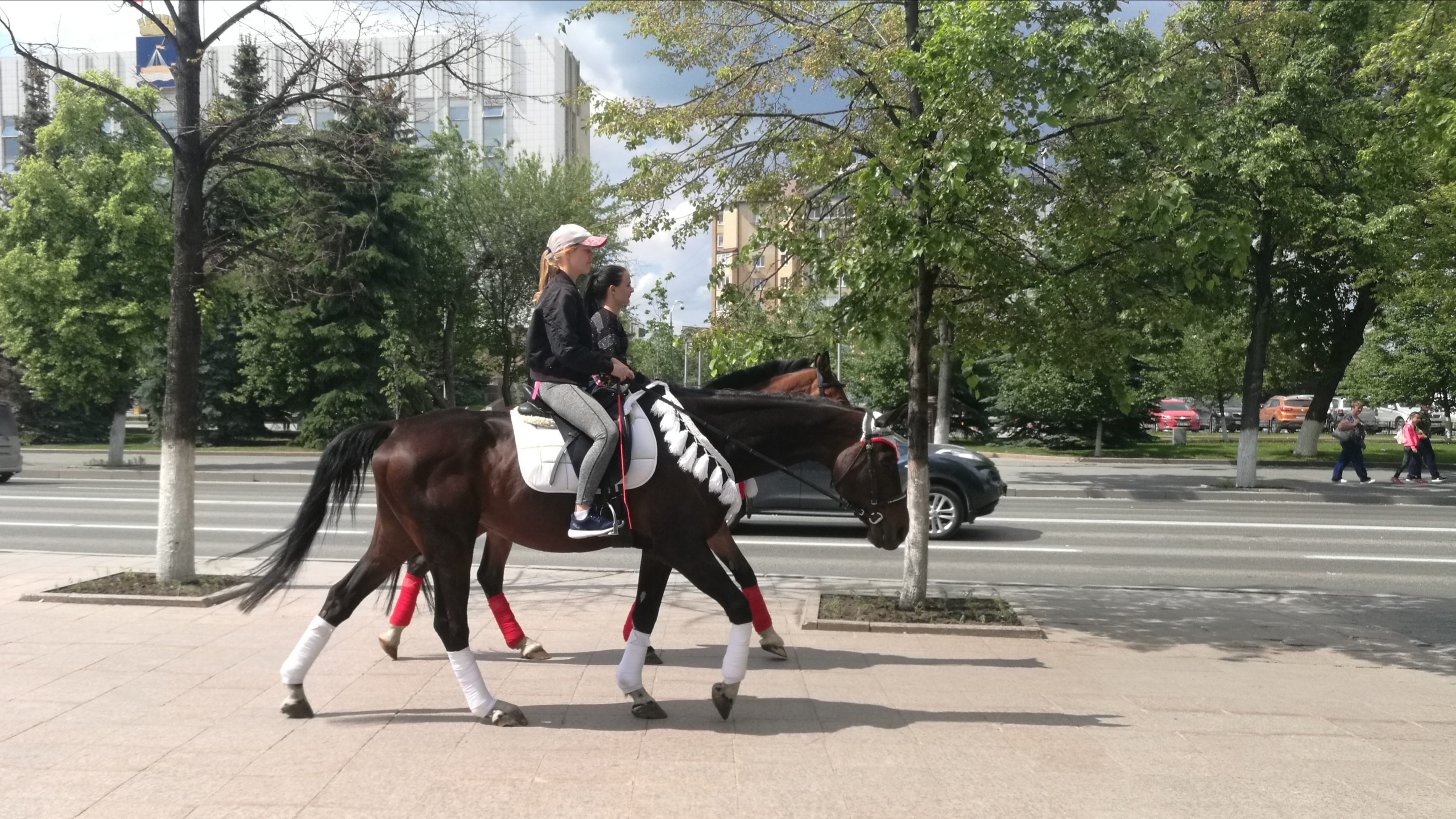 Ĉevalrajdistinoj ĉe Kolora bulvardo. Tjumeno, Rusio.